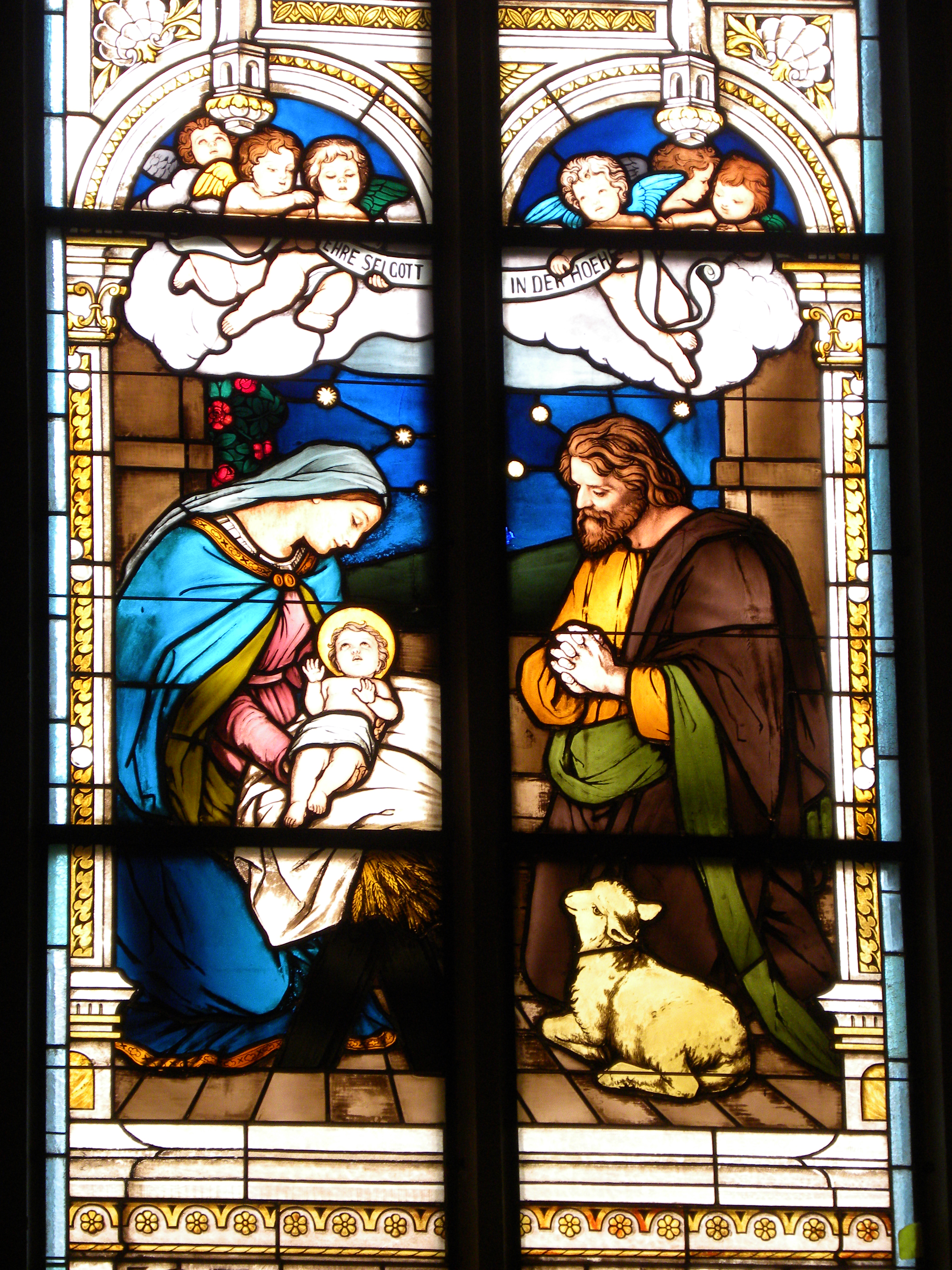 Ev. Stadtkirche in Stolpen, Weihnachtsbild im Chorraum. Foto: A. d´Orfey, Kunst im Licht, München, 2011